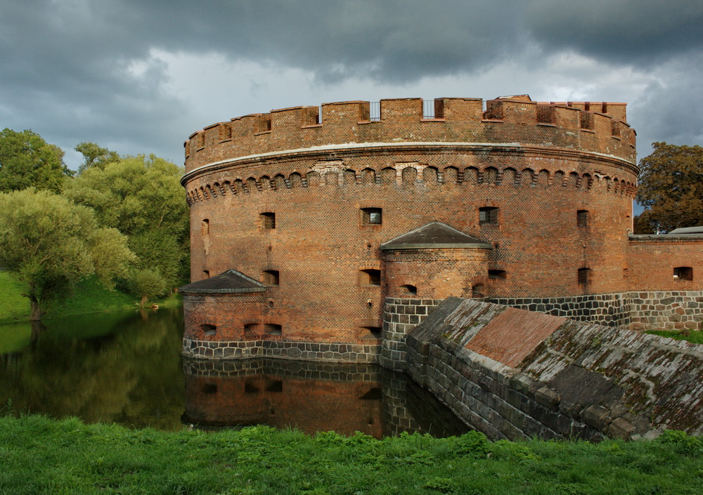 Der Donna